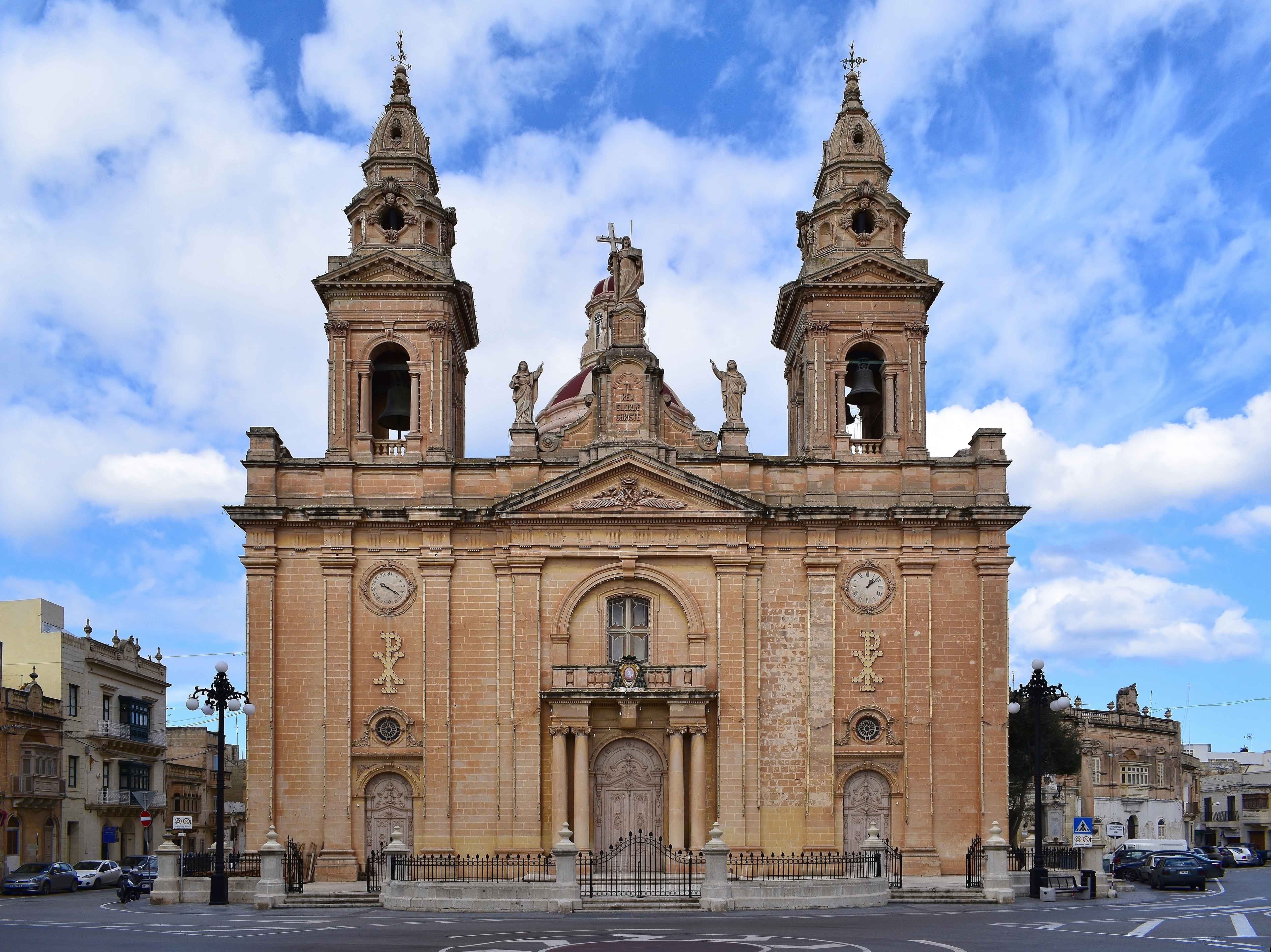 Església de Sant Andrés, Luqa. Malti: Knisja ta' Sant'Andrija, Ħal Luqa.